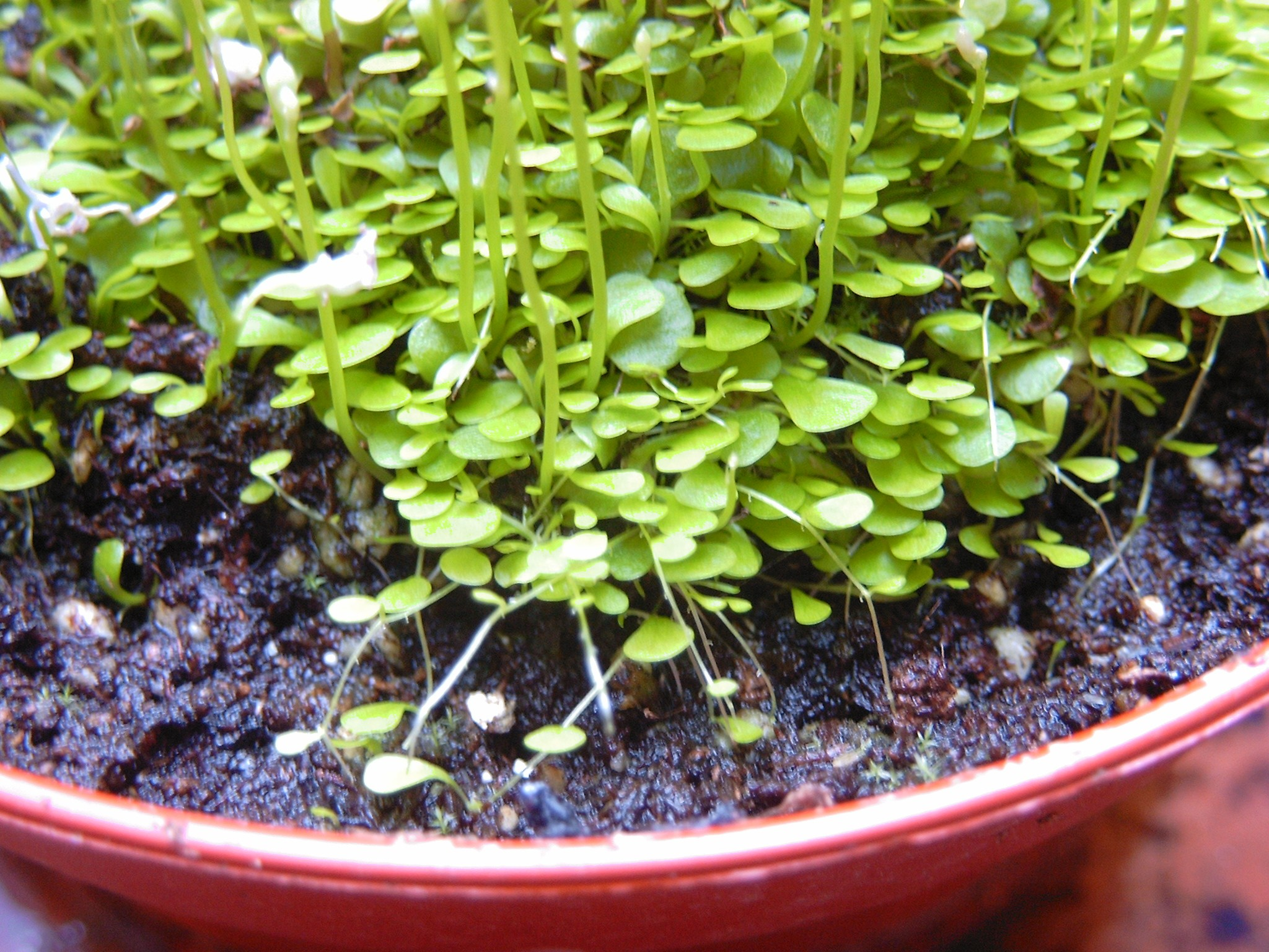 Utricularia sandersonii Stolones